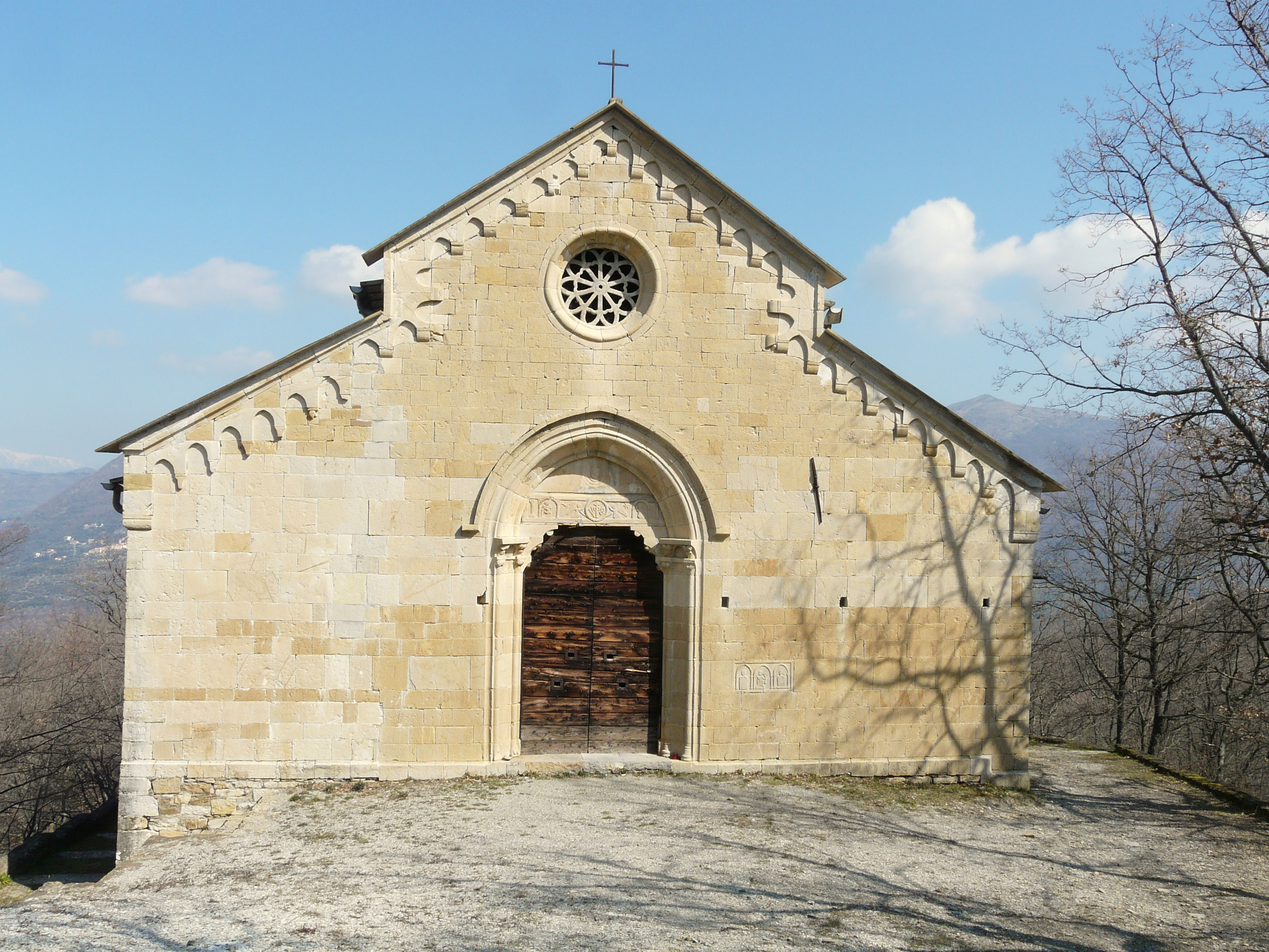 Chiesa della Maddalena, Lucinasco, Liguria, Italia